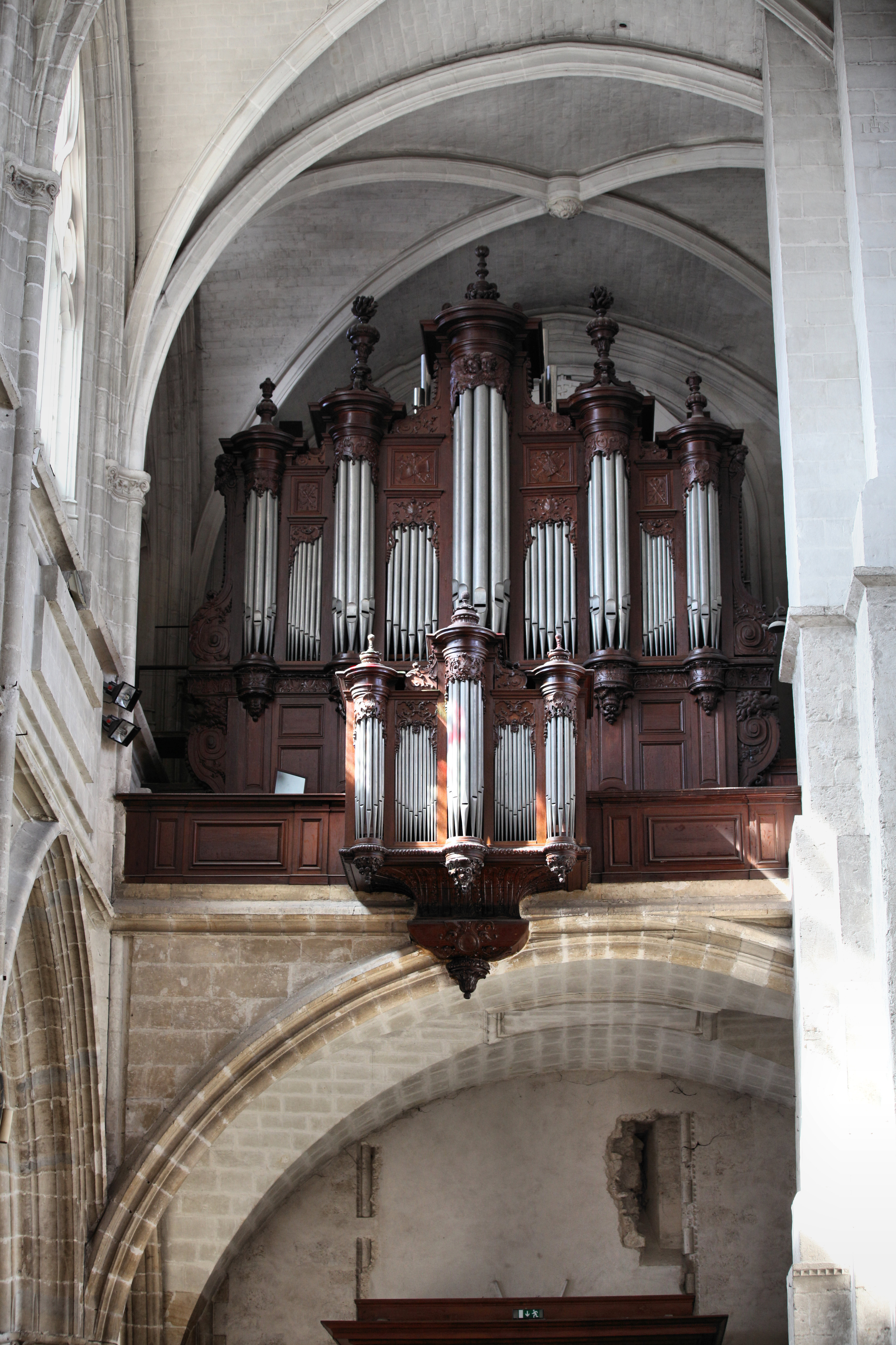 Orgue de la cathédrale Saint-Louis de Blois .